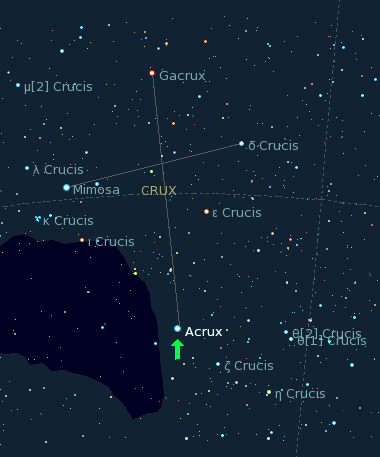 Acrux star